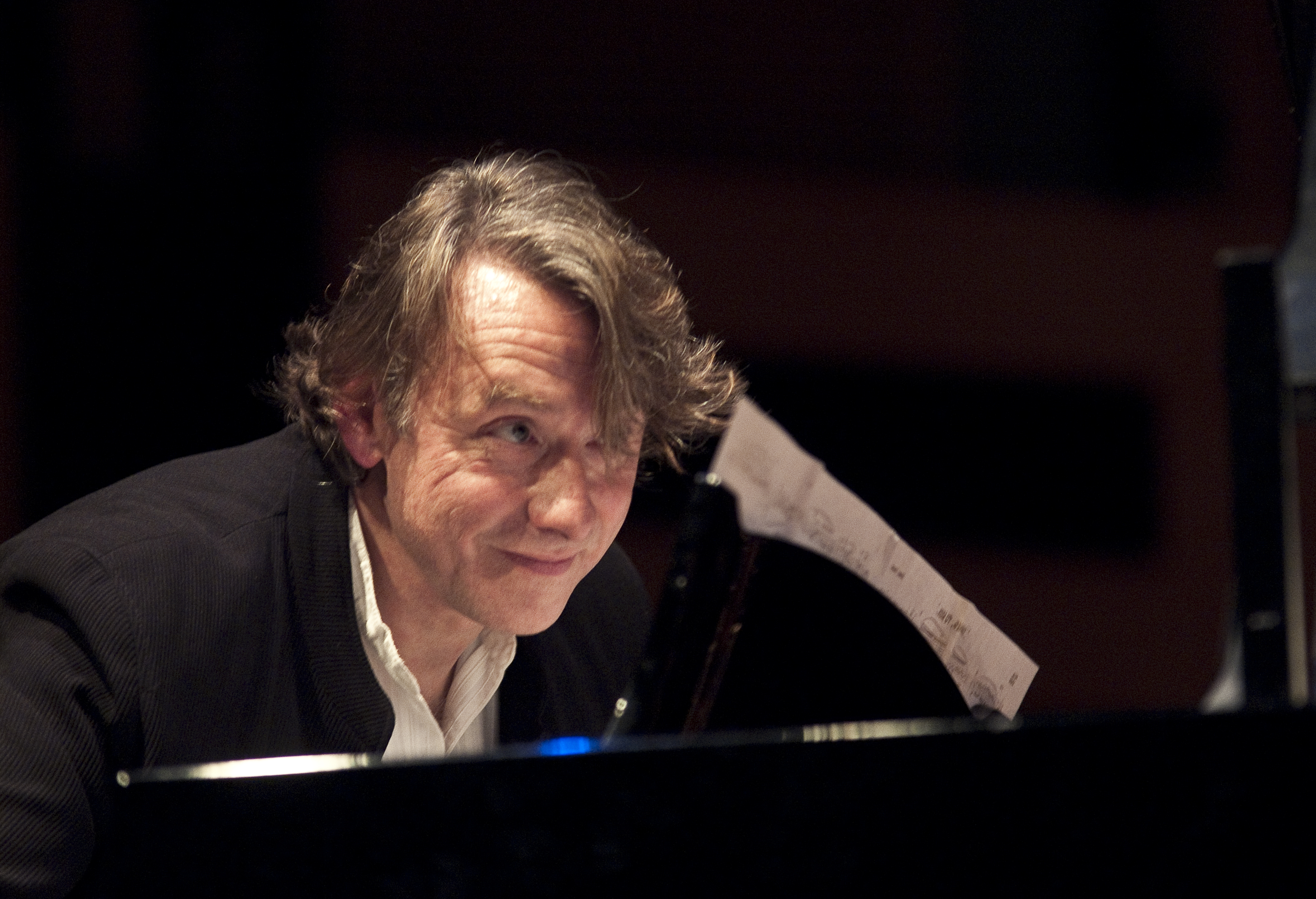 Patrick Defossez au piano lors d'un concert à Reims